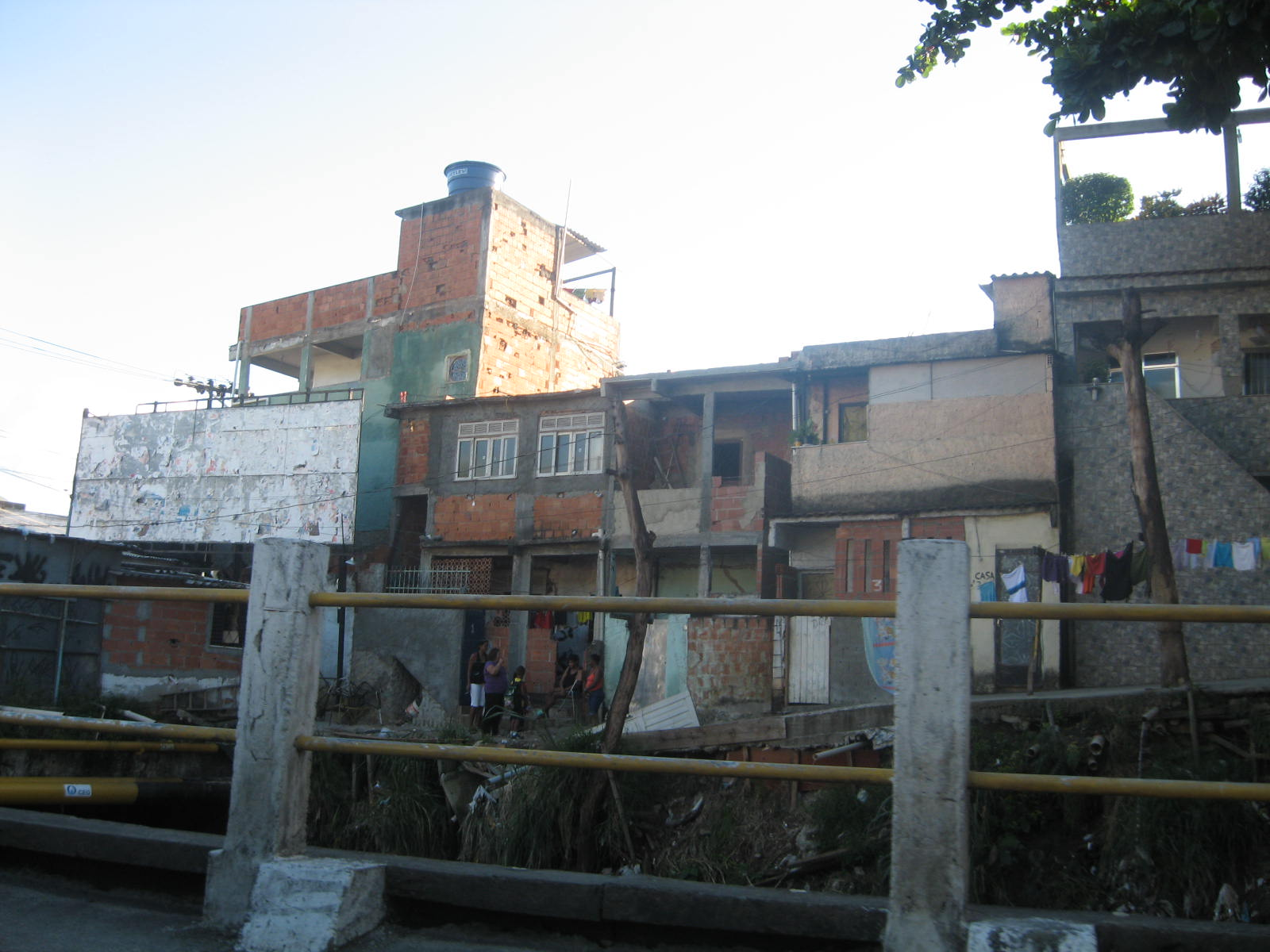 Vista parcial do Jacarezinho, localizado na zona norte da cidade do Rio de Janeiro.